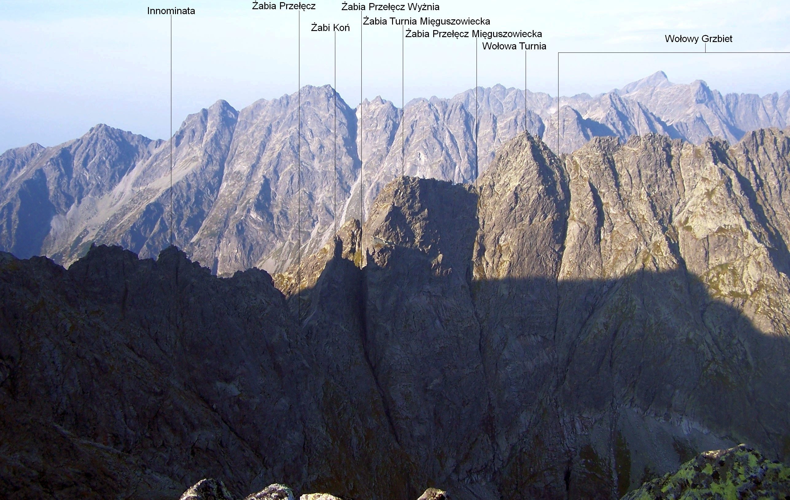 Wołowy Grzbiet